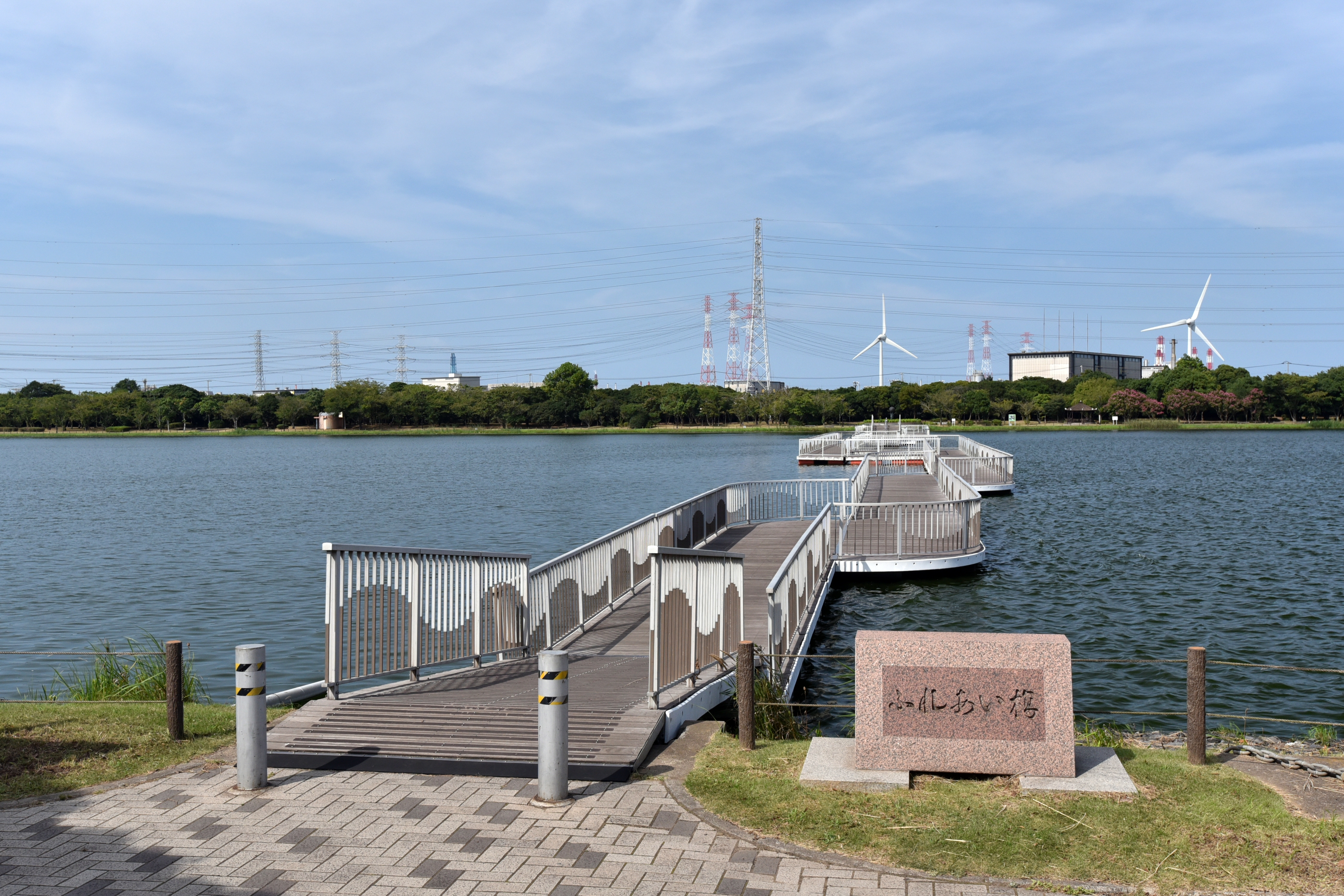 神之池の中央に架かる「ふれあい橋」（茨城県神栖市）。歩行者専用。神栖市文化センター側から北東の方向を見る。Nikon D750